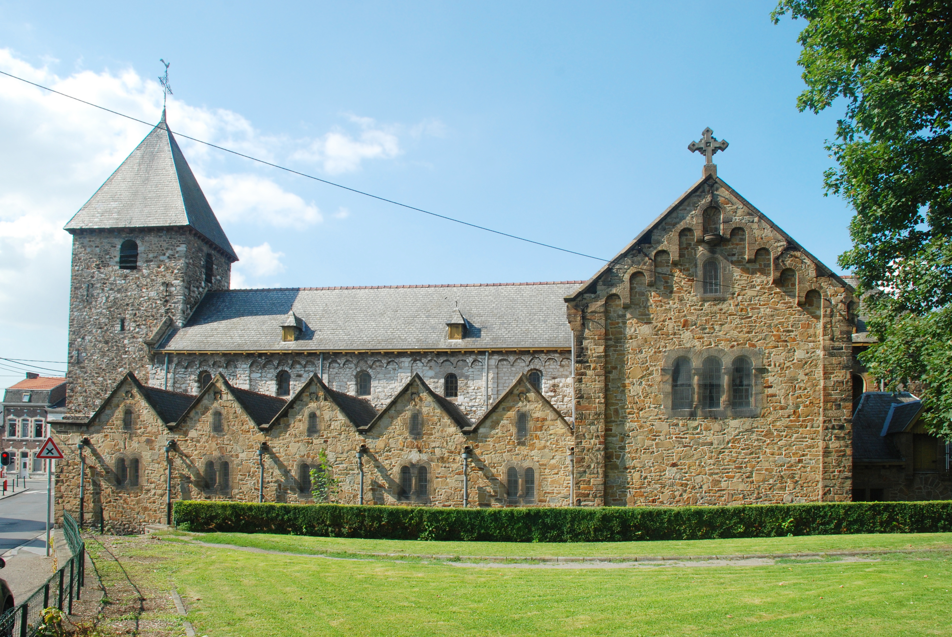 Belgique - Province de Namur - Église Saint-Pierre d'Andenelle